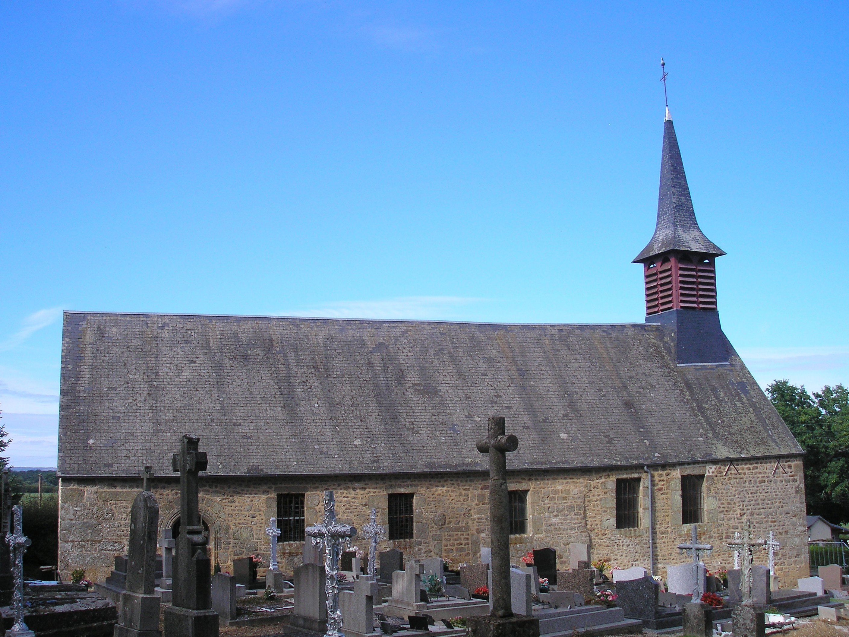 Notre-Dame-du-Rocher (Normandie, France). L'église Notre-Dame.